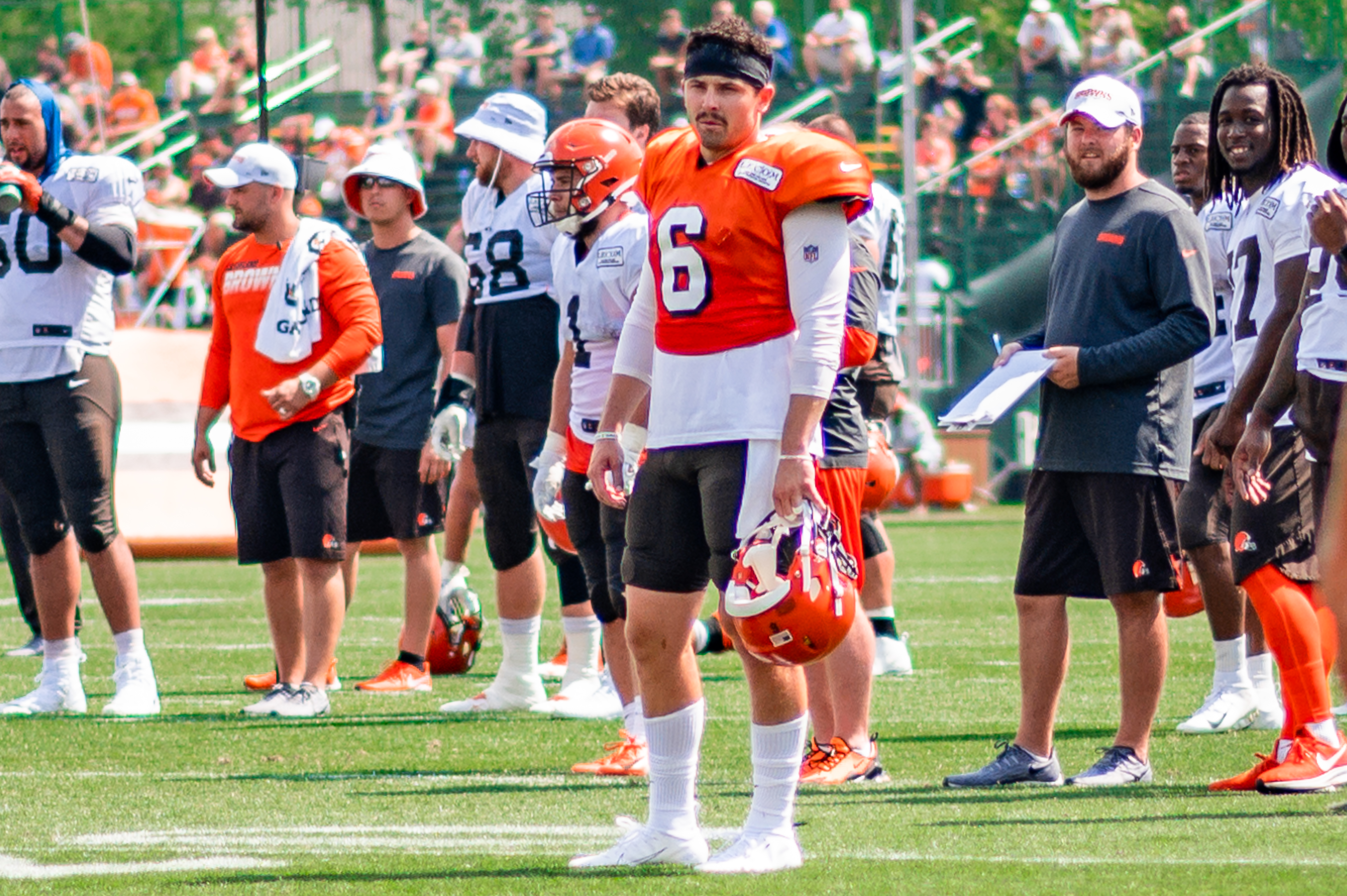 Baker Mayfield